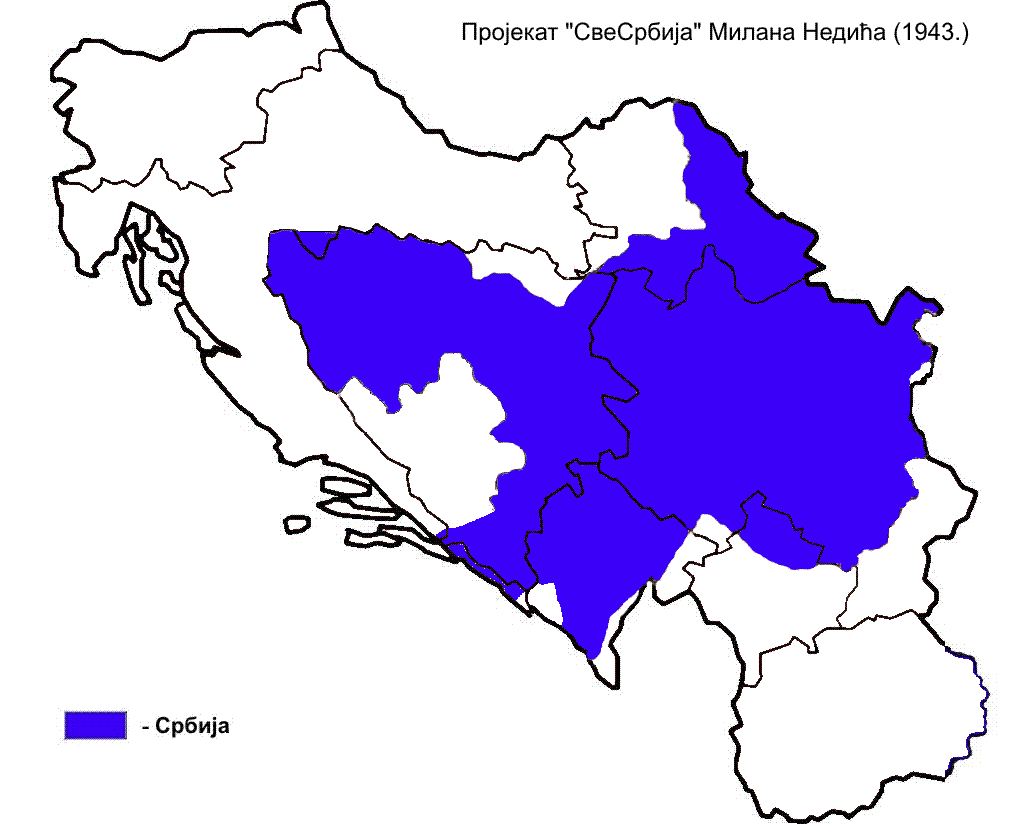 Пројекат "СвеСрбија" Генерала Милана Недића (1943.). Територијални приказ на карти са границама република и покрајина бивше СФРЈ.